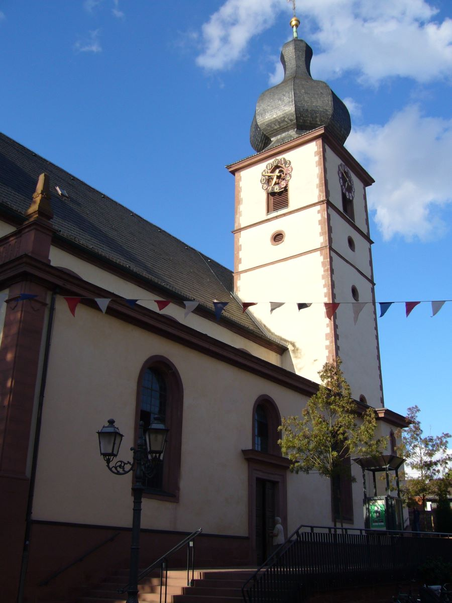 Die katholische Pfarrkirche St. Laurentius in Marktheidenfeld